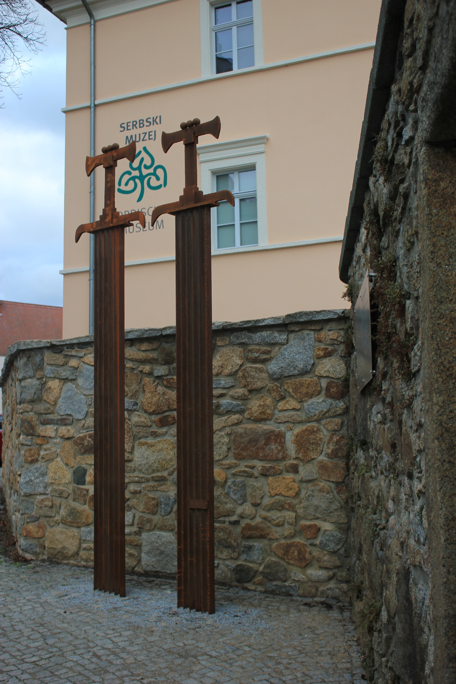 Hornjoserbsce: Pomnik za Budyski měr lěta 1018 na Budyskim hrodźe